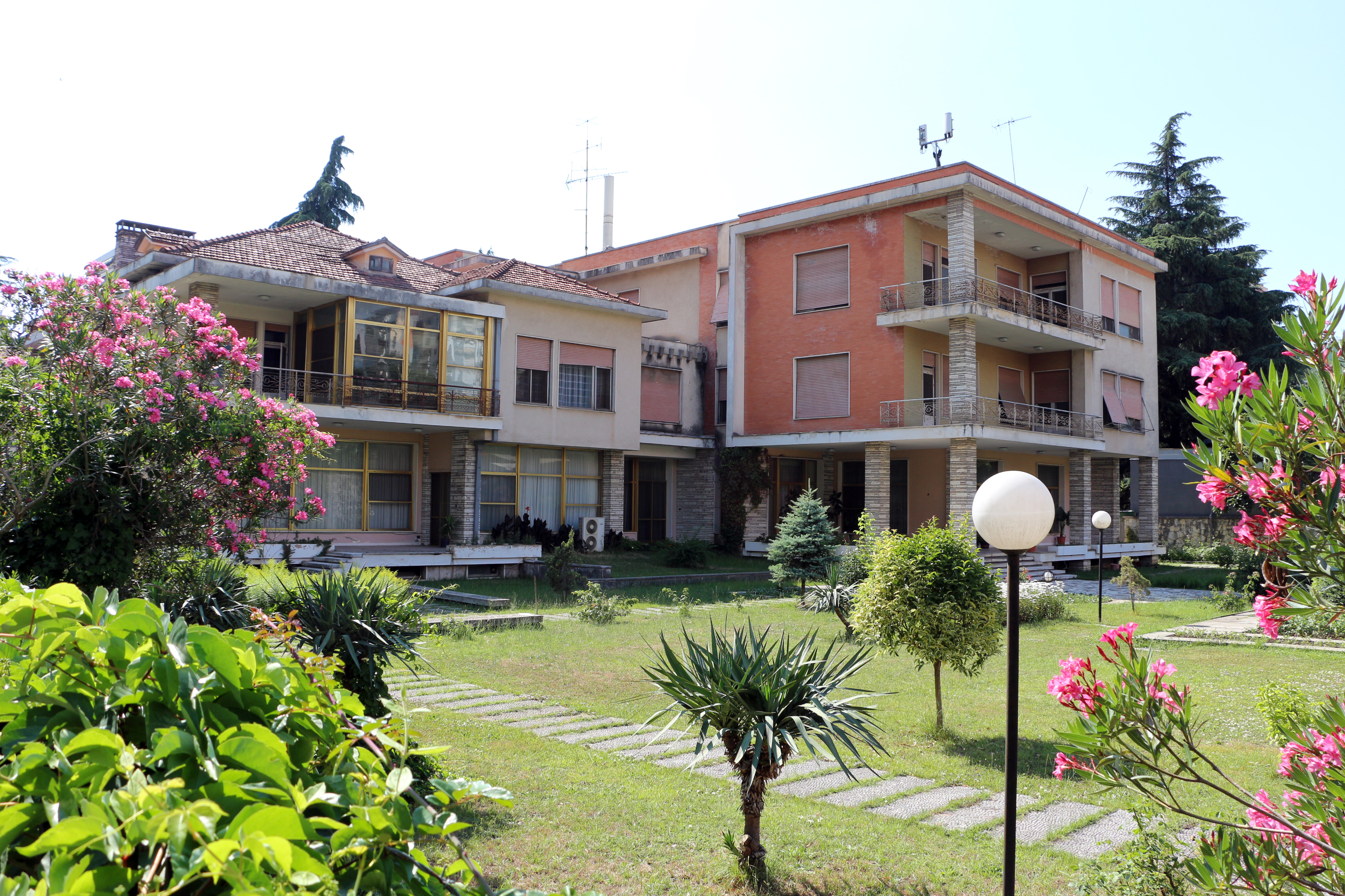 Aksi Kryesor Dhe Qendra Historike e Tiranës